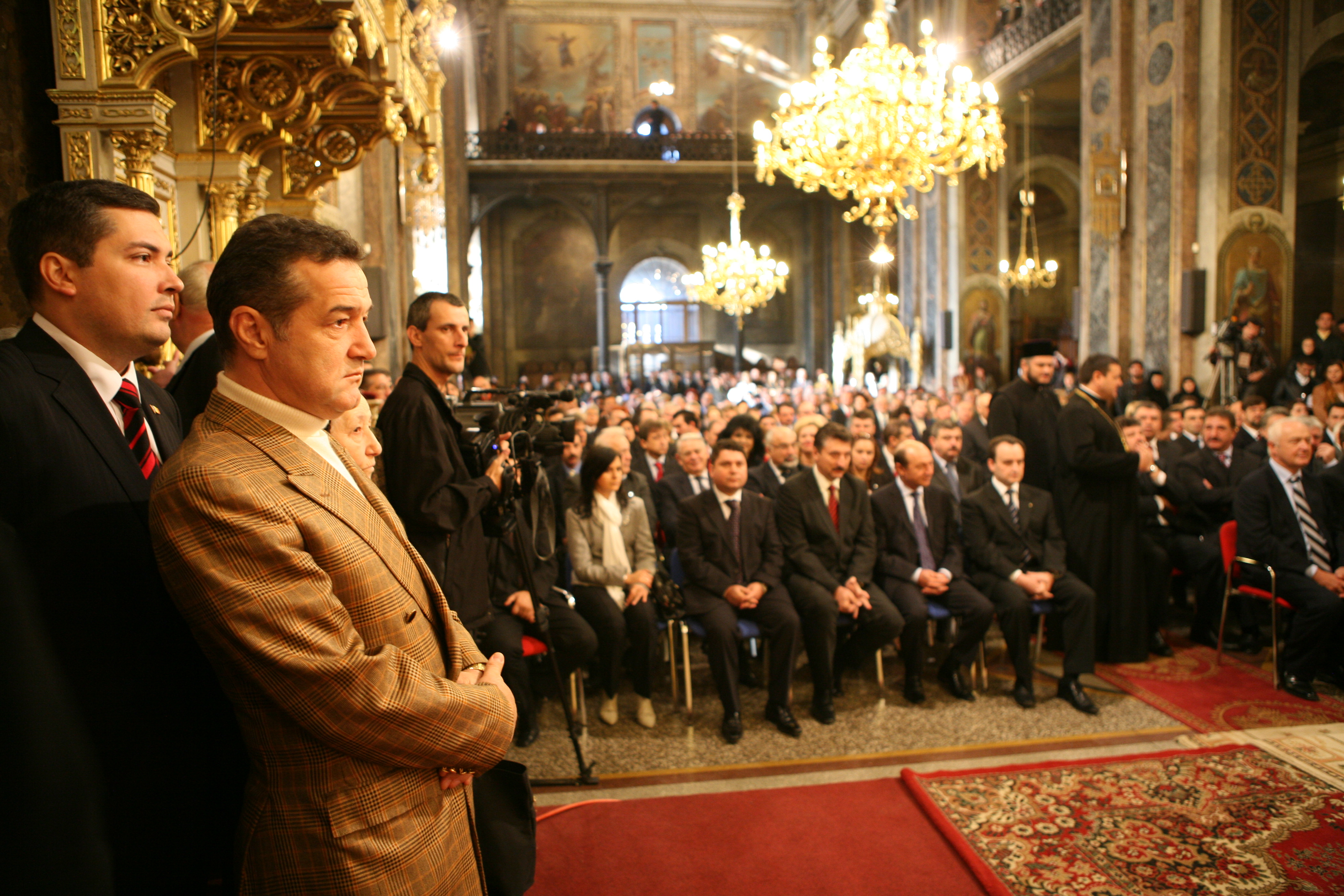 Presedintele PNG-CD, George Becali şi deputatul Vlad Hogea (vicepresedinte al partidului), in Catedrala Mitropolitana din Iasi (14 octombrie 2006)